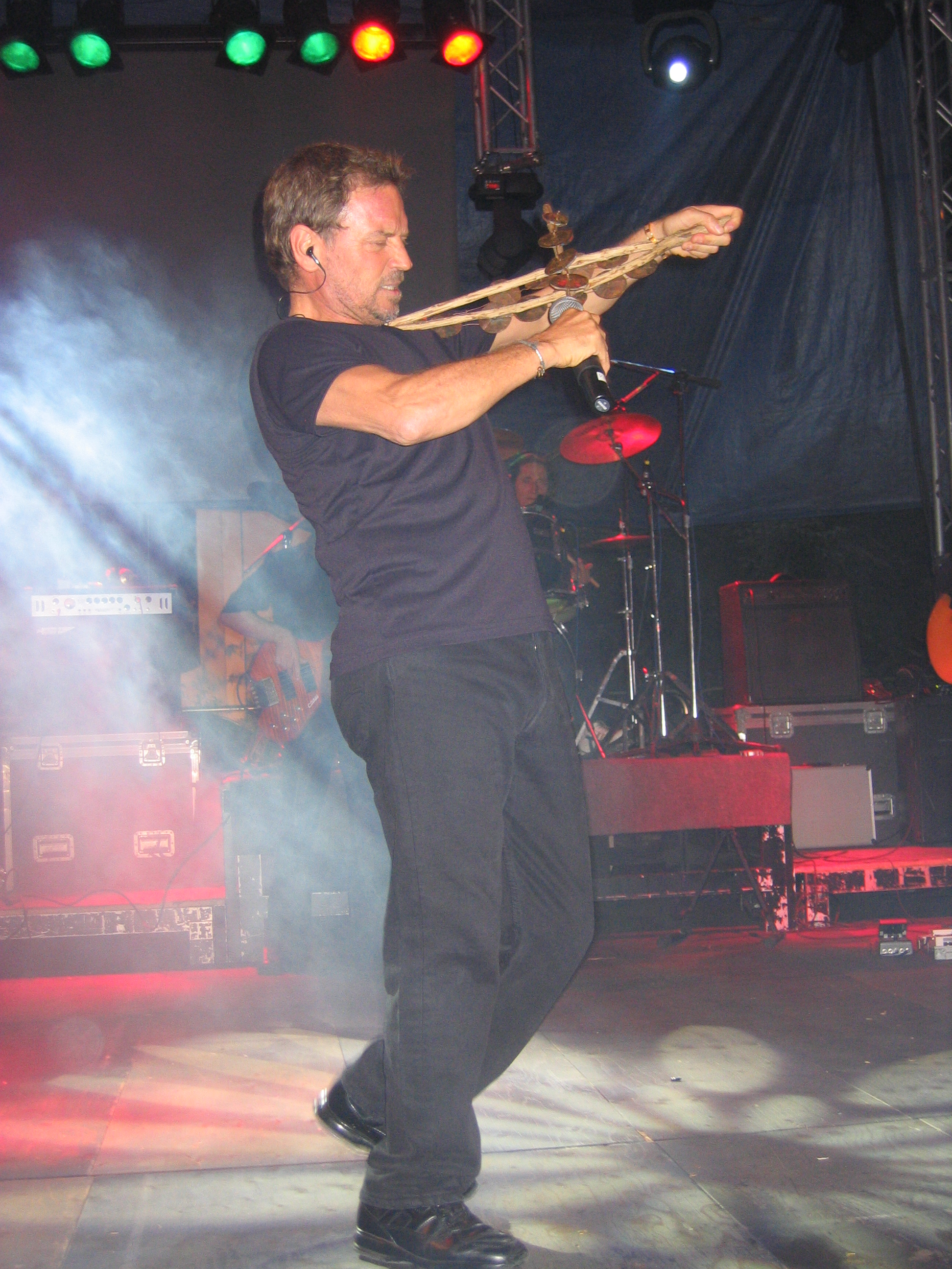 FRANCO SIMONE Concerto Siciliano Estate 2005 Foto Domenico Notarnicola